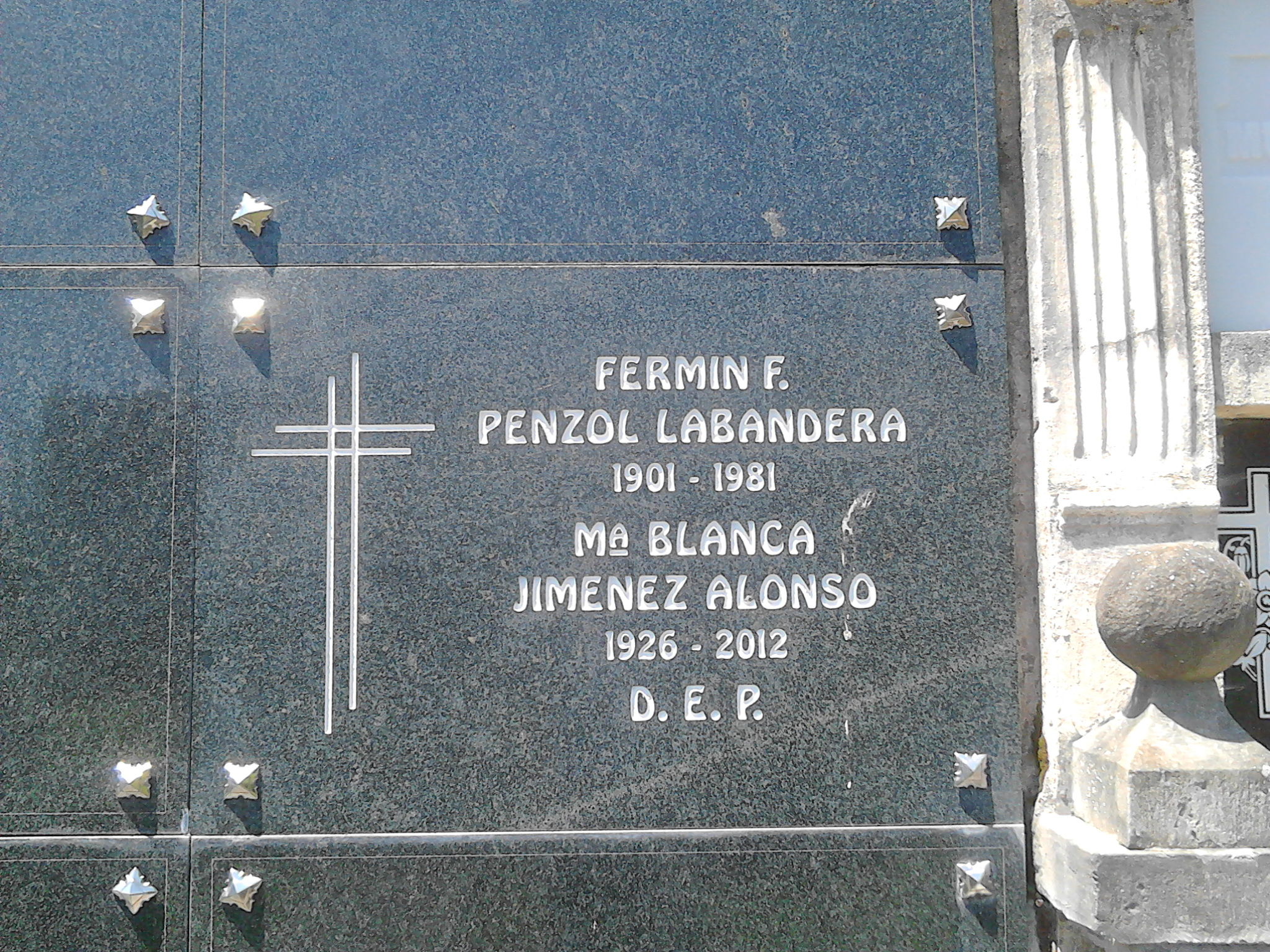 Sepultura de Fermín Penzol e a súa dona en Castropol